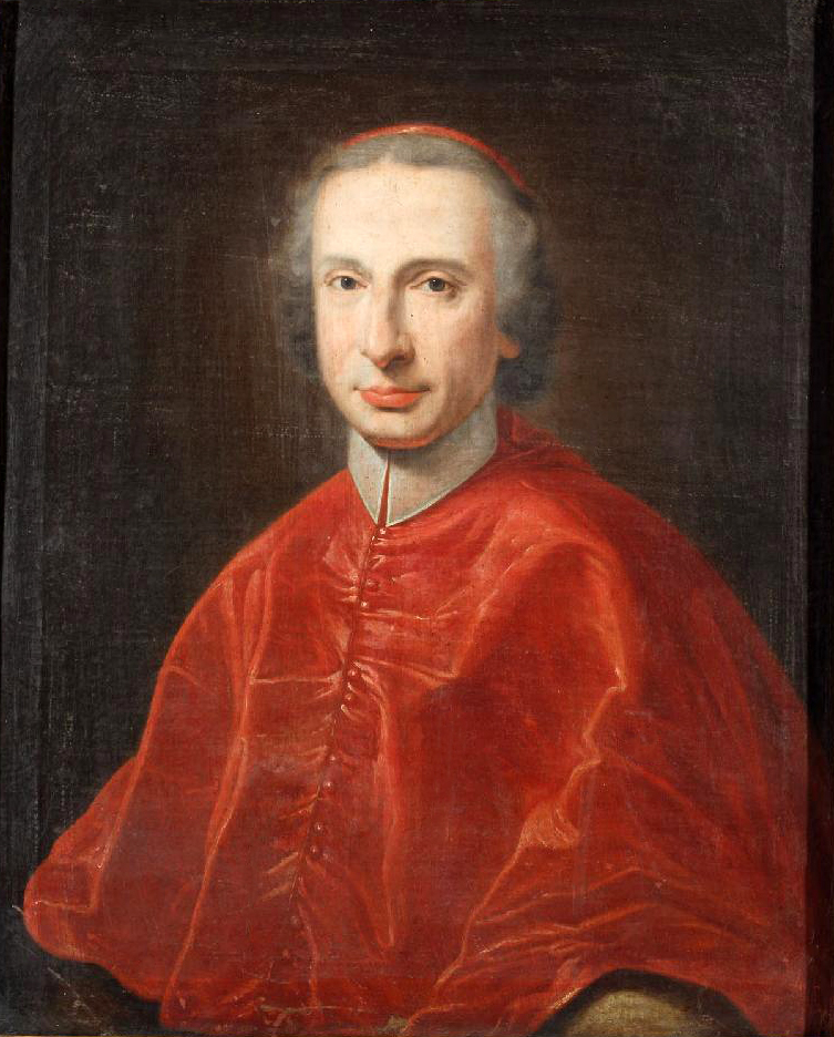 iscrizione (retro) CARDINALE SPINELLI ARCIVESCOVO DI NAPOLI; S P SACRESTIA